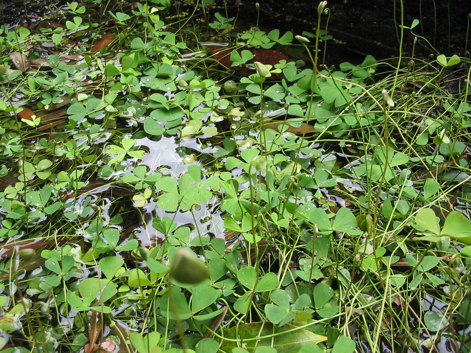 Marsilea azorica - Habitus